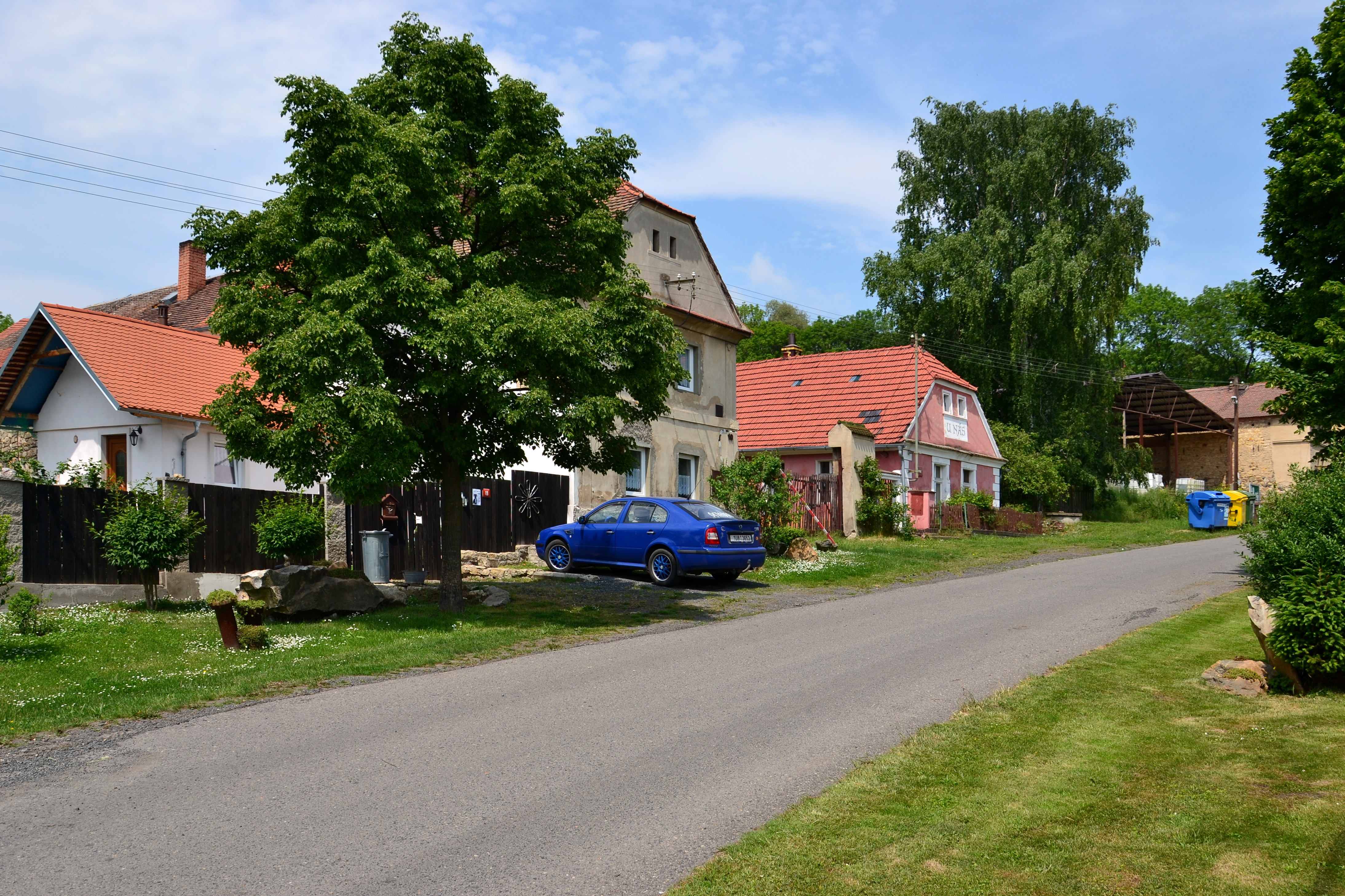 Náves z jihu